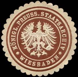 Sealing stamp Title: Königlich Preussisches Staatsarchiv - Wiesbaden Description: braun, weiß, geprägt Place: Wiesbaden size: 4 cm